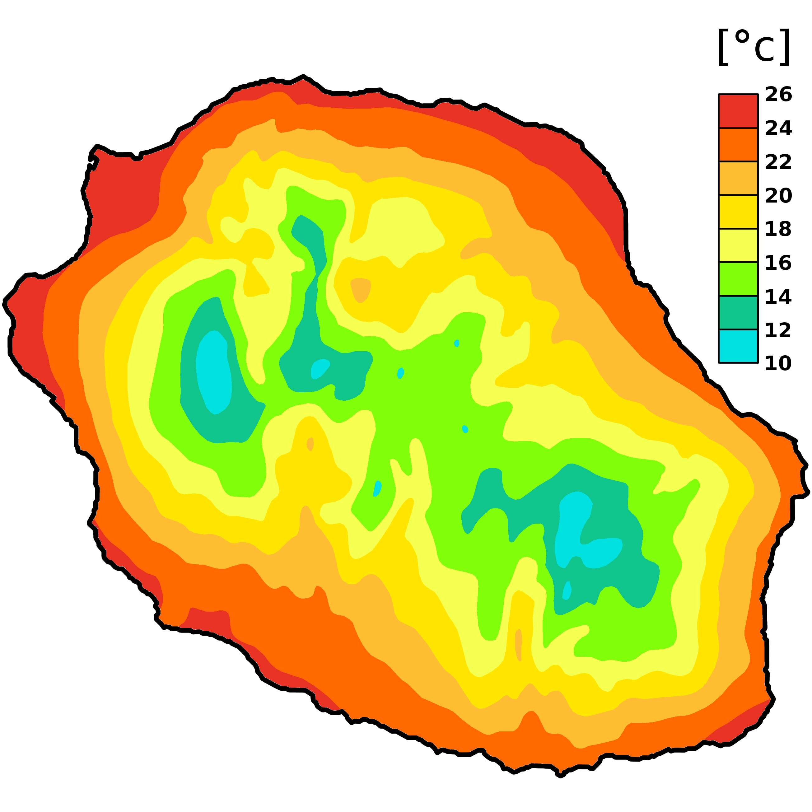 Carte des températures annuelles moyennes sur l'île de la Réunion selon les données de Météo-France